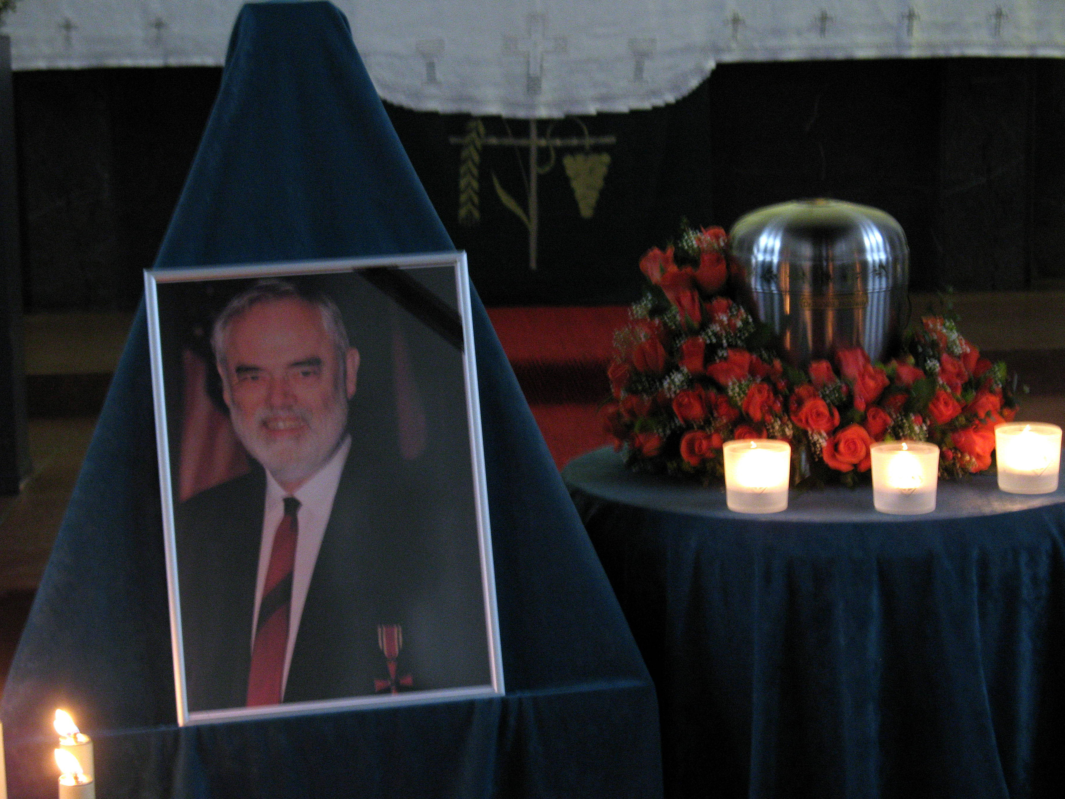 Ron Holloways Urne bei der Trauerfeier am 17. Januar 2010